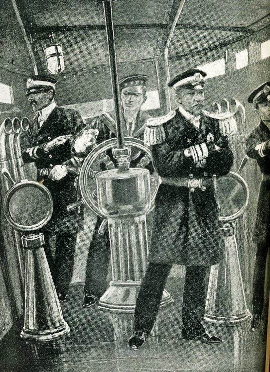 l'Amiral Togo donnant des ordres dans la casemate blindée de son vaisseau amiral